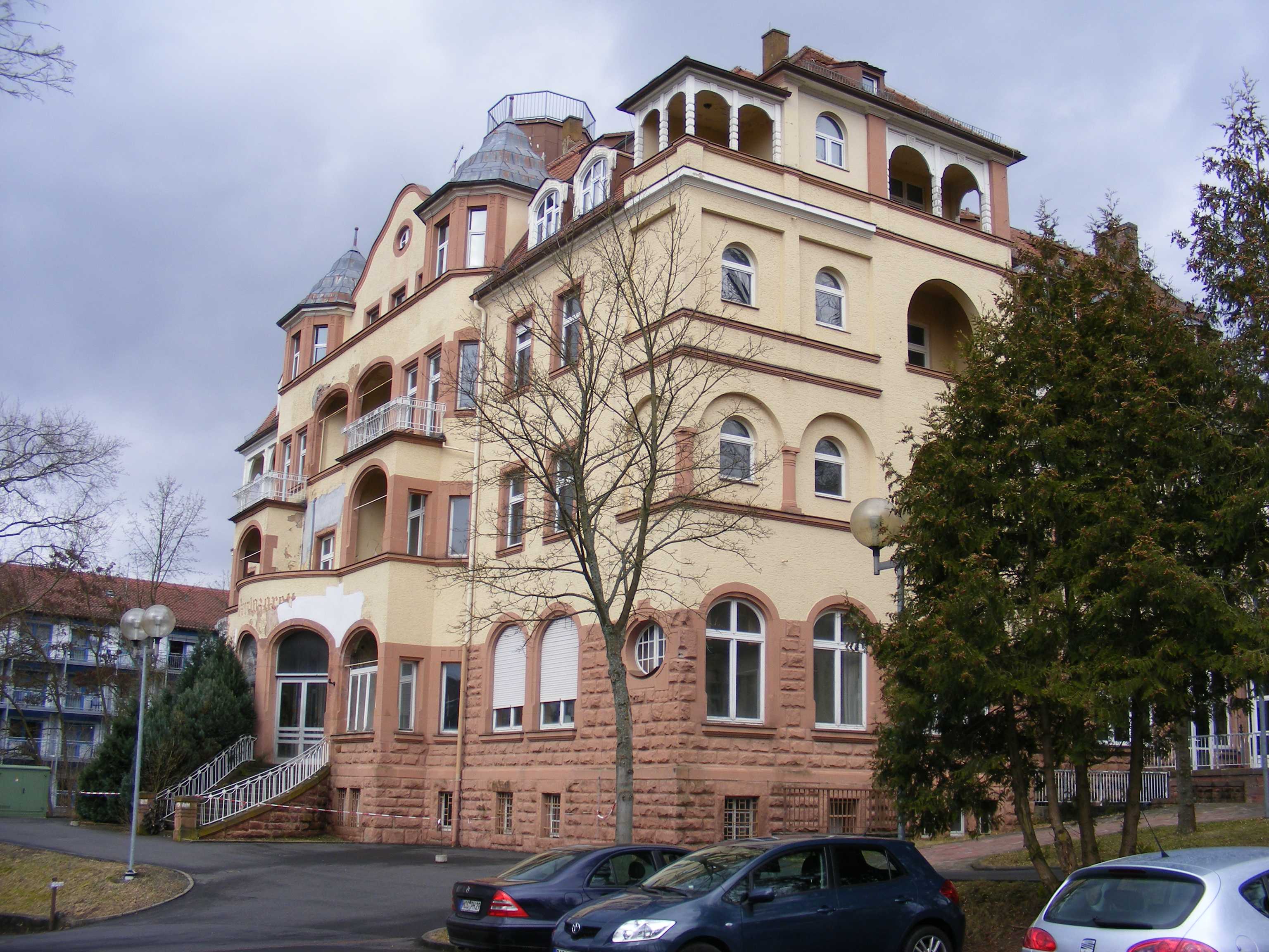 Bad Kissingen - Marinekurlazarett, erbaut um 1910, ca. 15.000 m2, Außenansicht seitl. re., seit Jahren leerstehend, Kurhausstraße 11